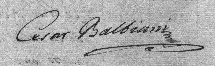 Firma de César Balbiani